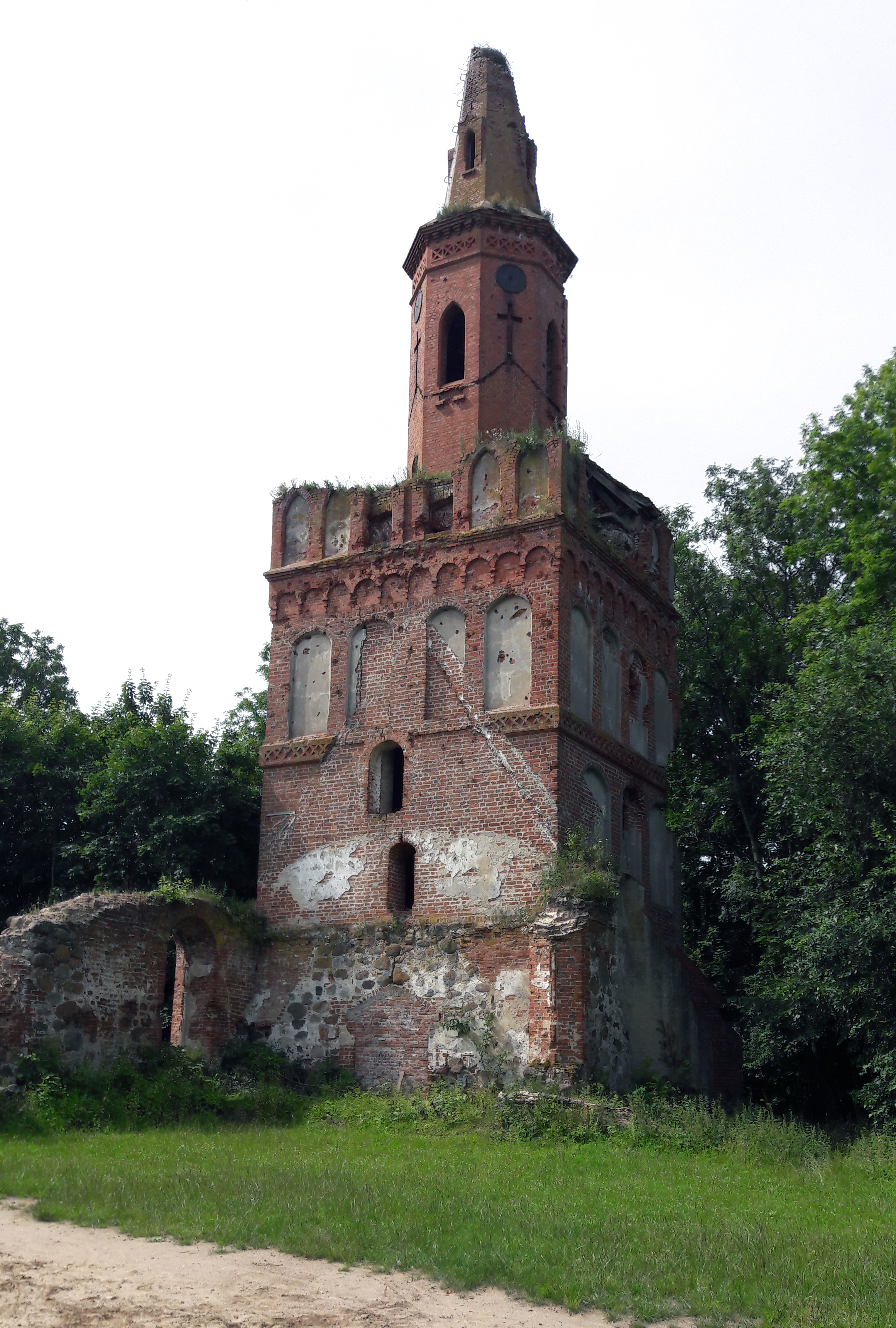 Кирха Удервангена. Чехово, Багратионовский район, Калининградская область